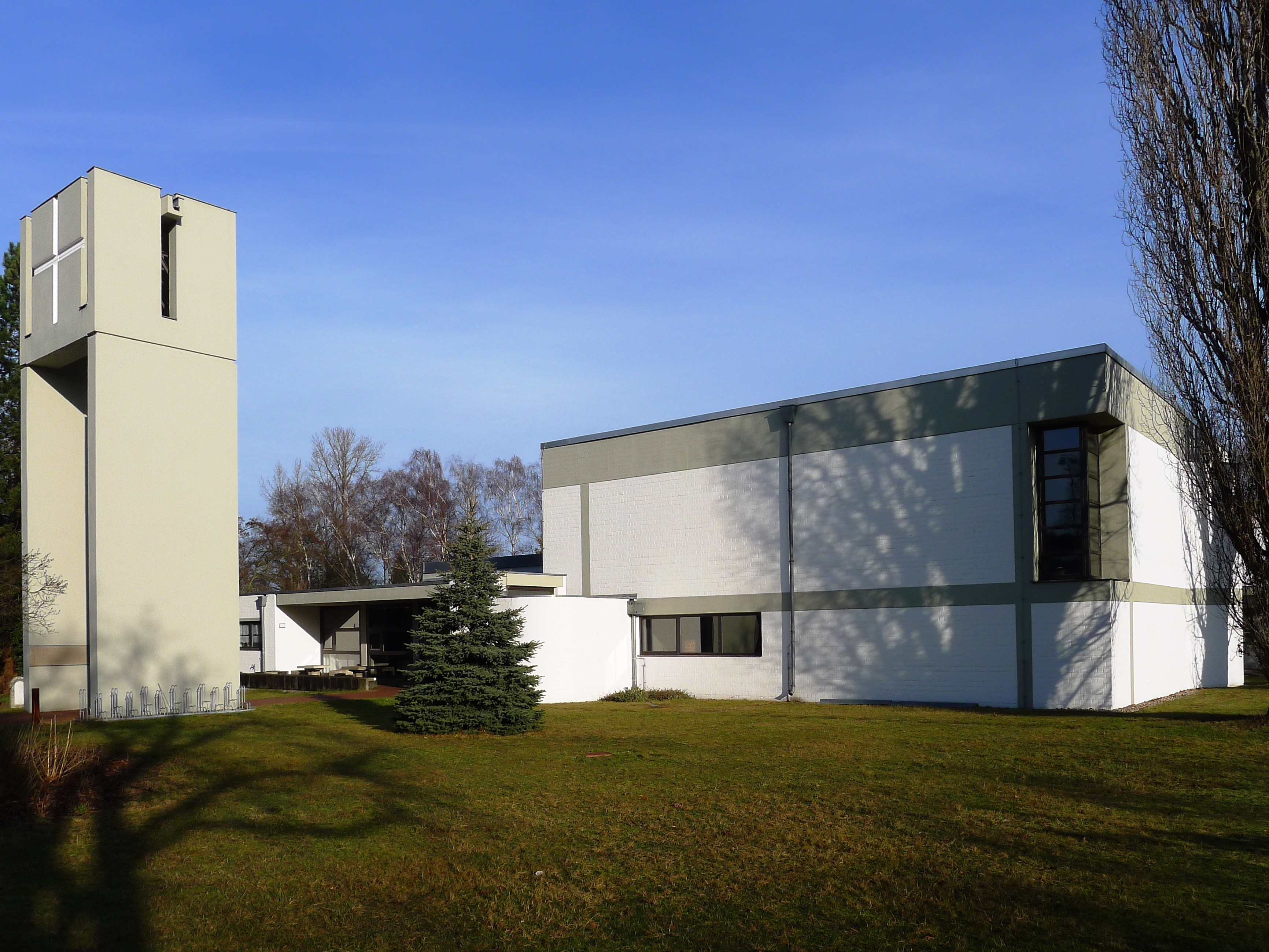 Blick auf Kirche und Campanile